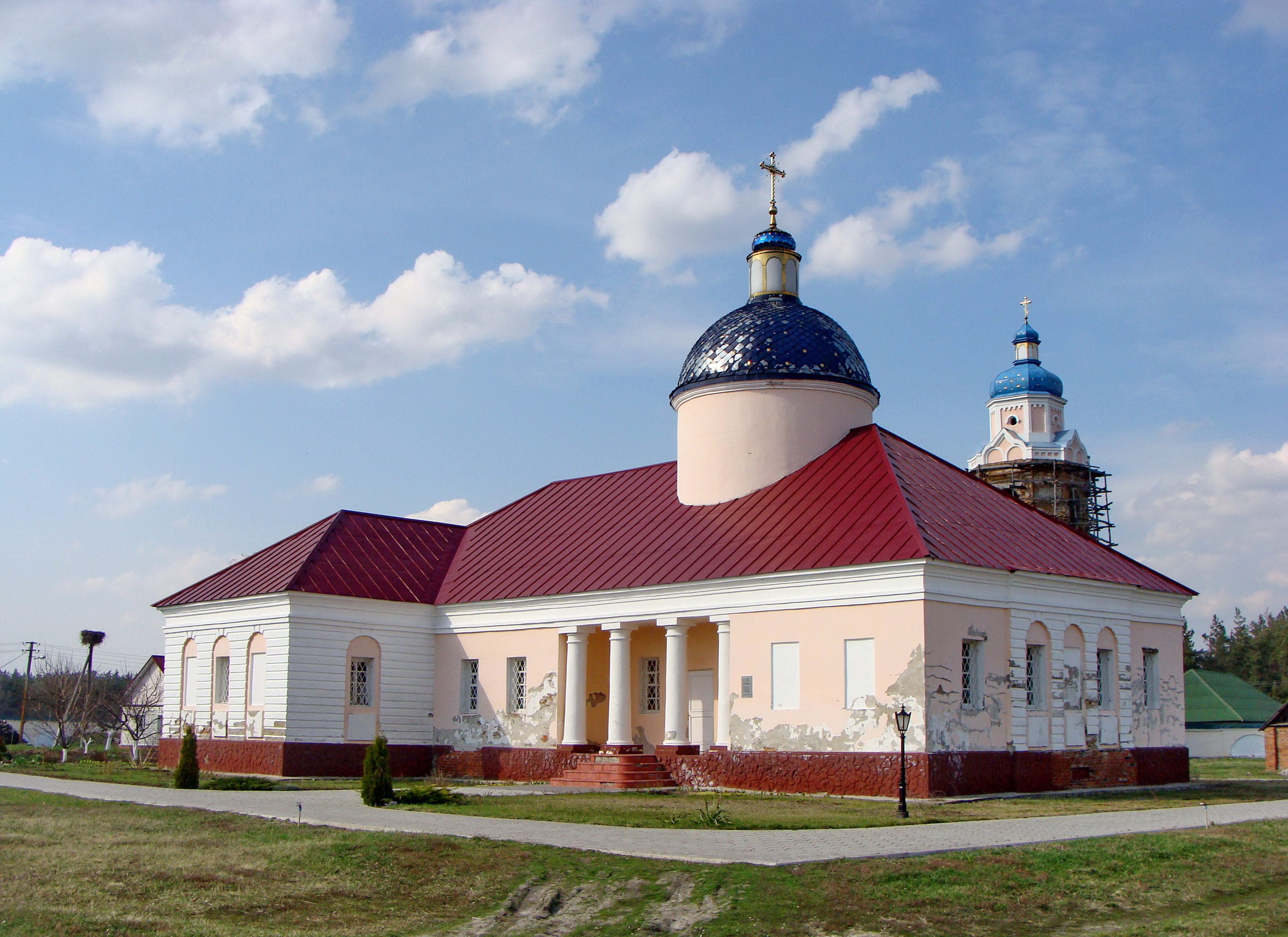 Дім настоятеля та Спасо-Преображенська трапезна церква Крупницько-Батуринського монастиря (мур.), Осіч